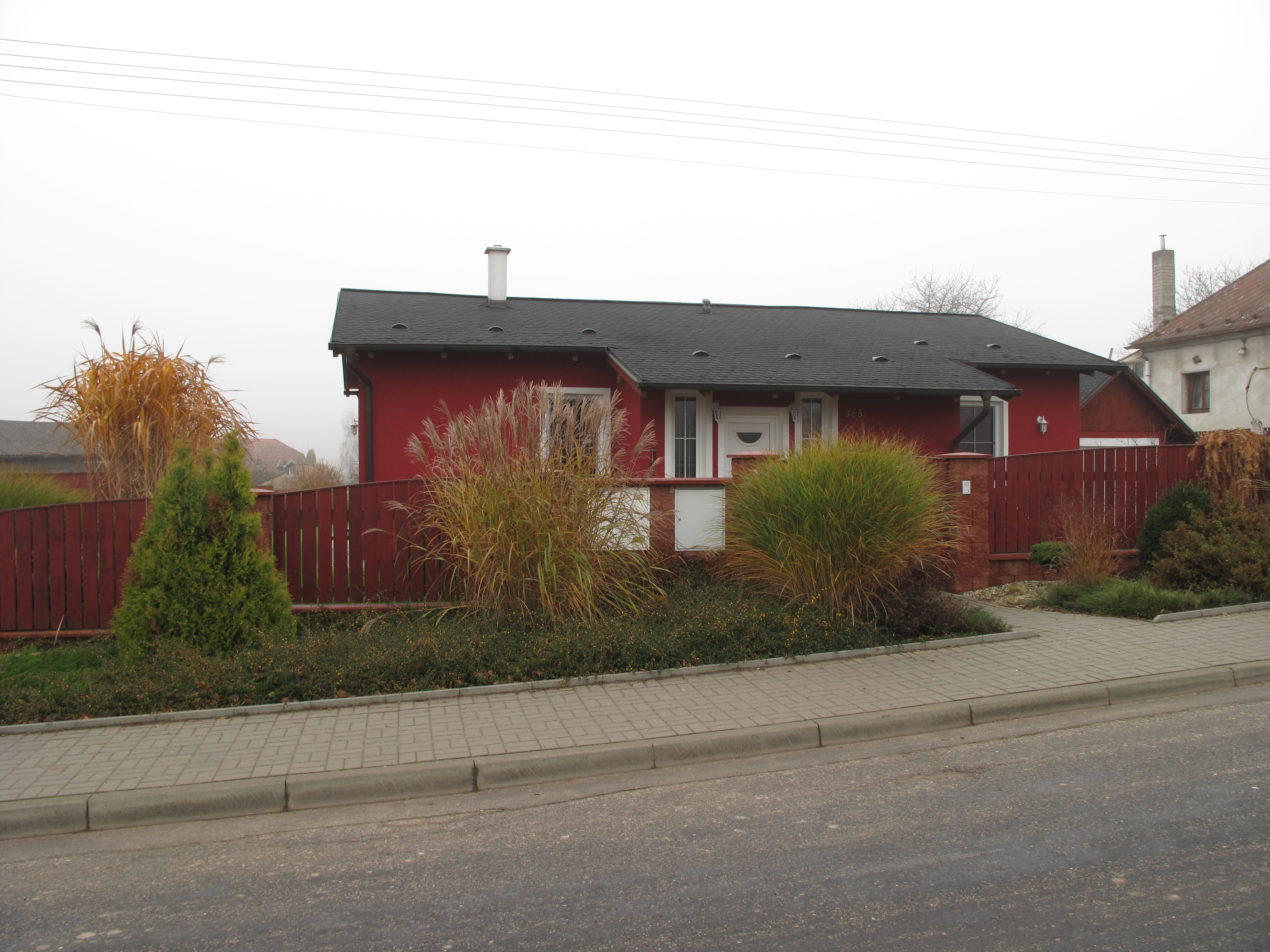 Karmínový dům v Rynholci. Okres Rakovník, Česká republika.